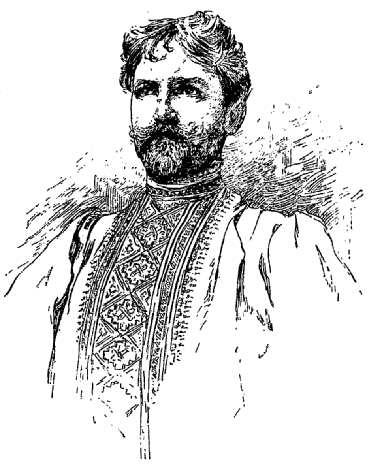 Portrait de Mucha par lui-même